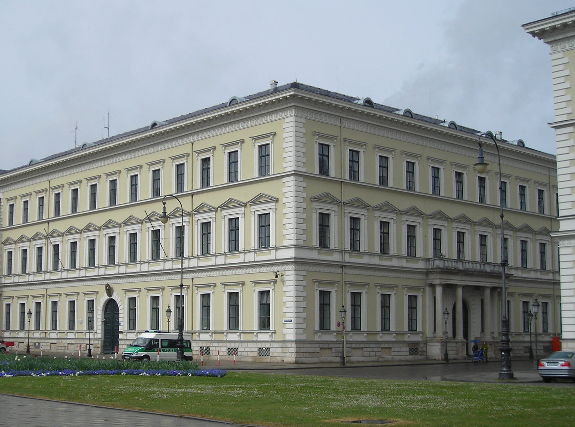 Bayerisches Staatsministerium des Innern, Odeonspl. 3, München - Dienstgebäude, Außenansicht von der Ludwigstraße südwestlich gesehen.